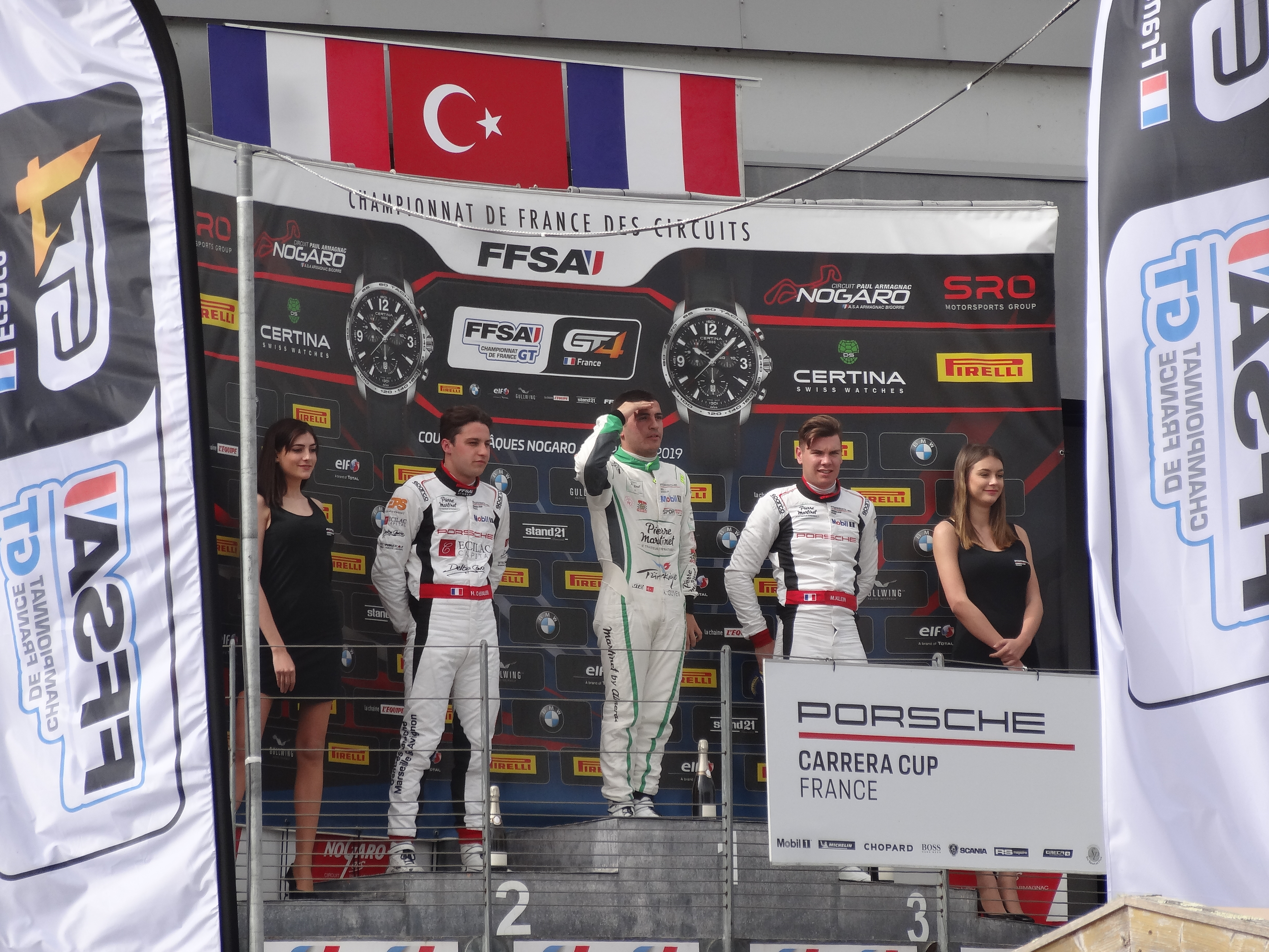 52e Coupes de Pâques (sport automobile), sur le Circuit Paul Armagnac à Nogaro (Gers) : Porsche Carrera Cup France - Podium avec de gauche à droite Hugo Chevalier, le vainqueur Ayhancan Güven, et Marvin Klein.